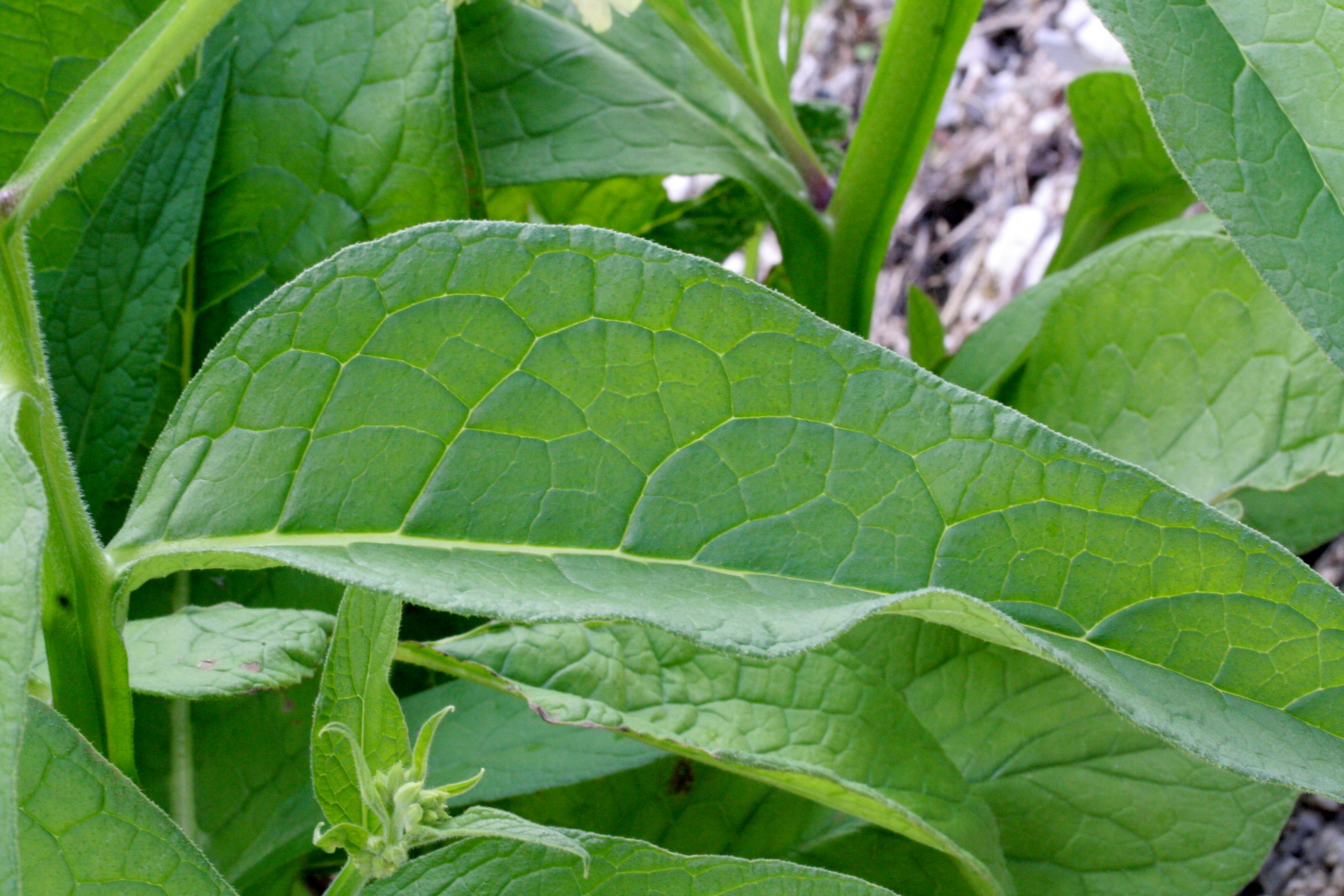 Symphytum_officinale (Consolida maggiore) Località Cortina (BL), 1400 m s.l.m.